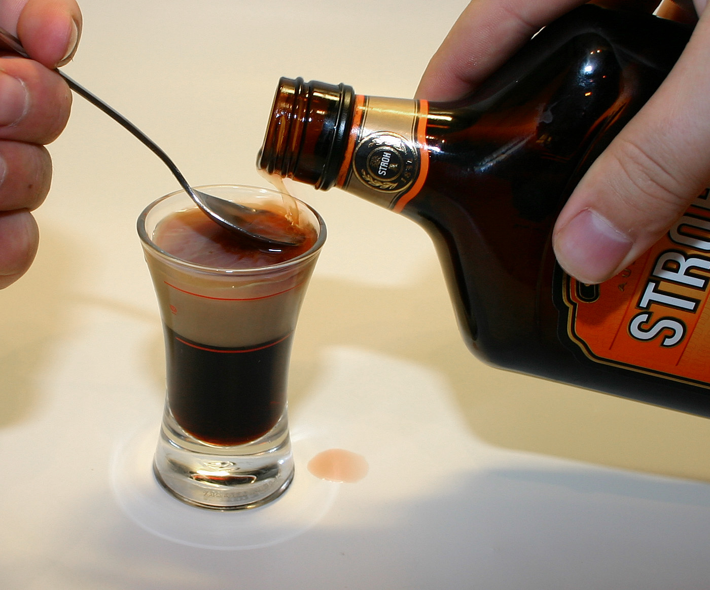 making Cocktail Shot B52 ...